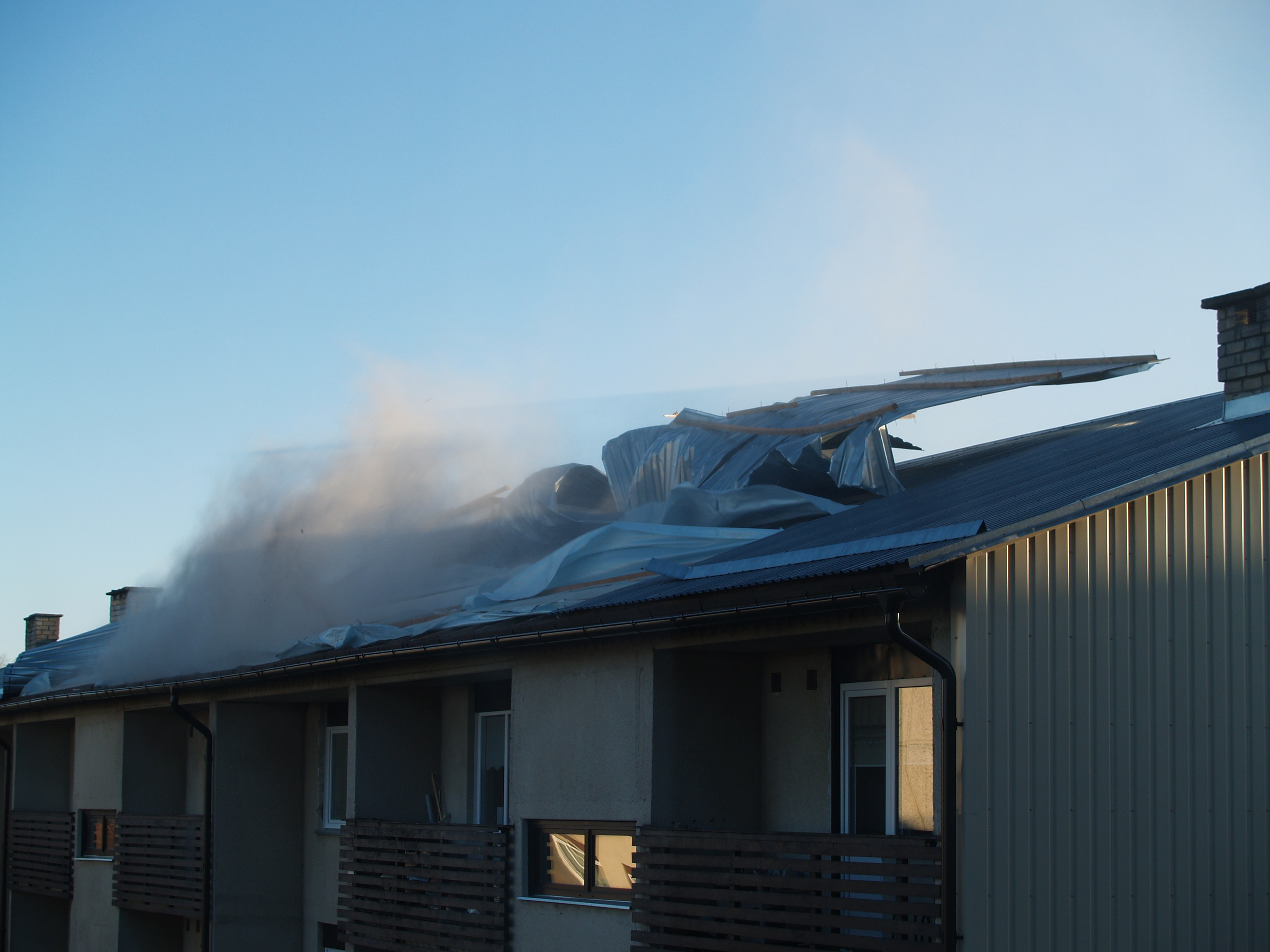 Detsembritorm 2011. aastal kiskumas katust ühelt Kosel alevikus asuvalt majalt.